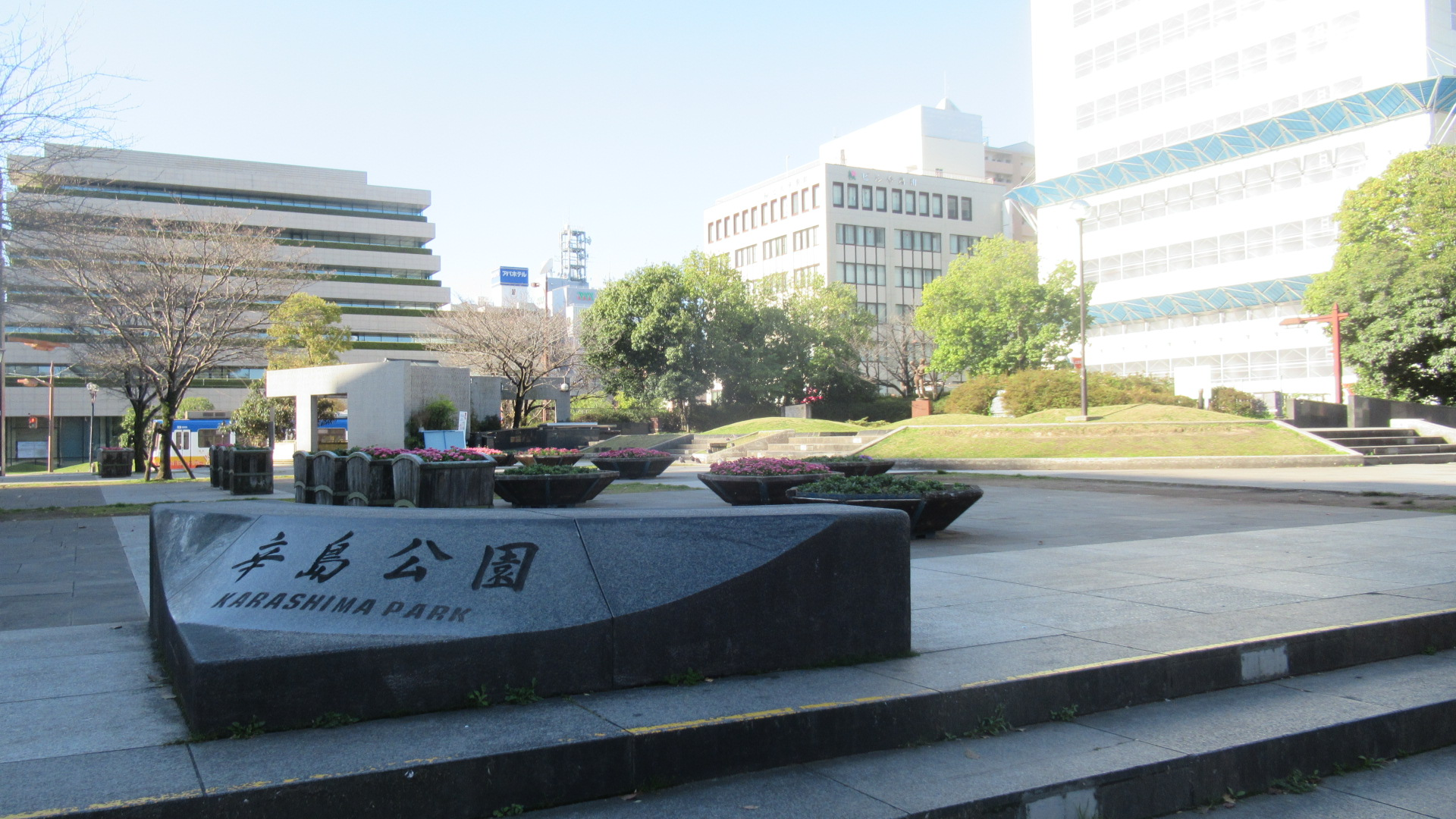 辛島公園（2020年3月）